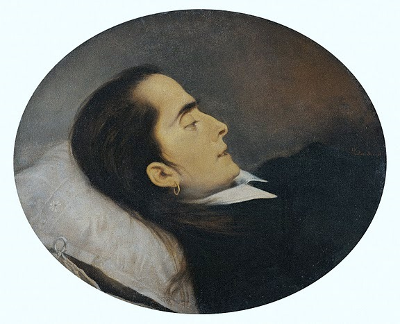 A MORTA, Óleo sobre tela - 50,5 x 61,2 cm